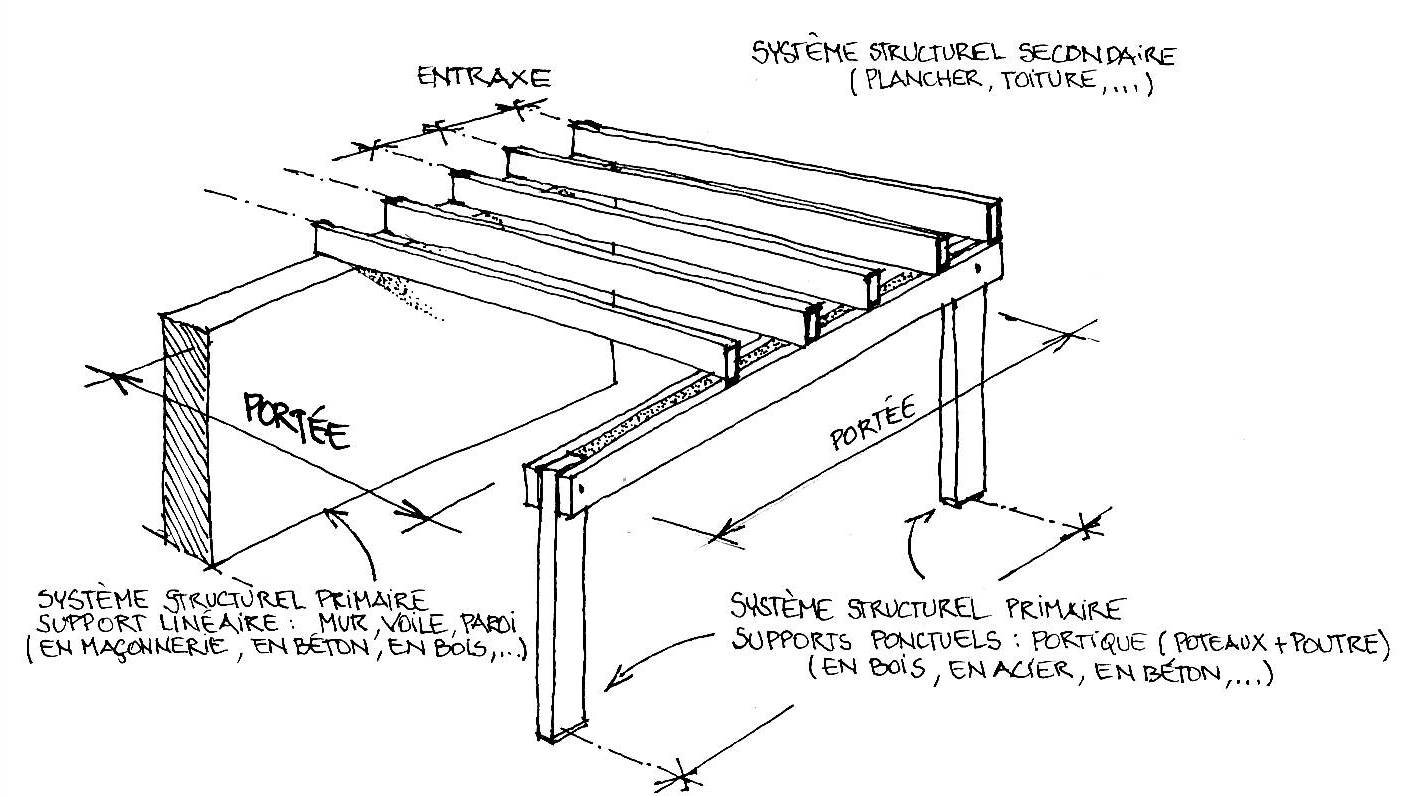 dessin schématique pour amorcer les notions élémentaires de structures, portée et entraxe